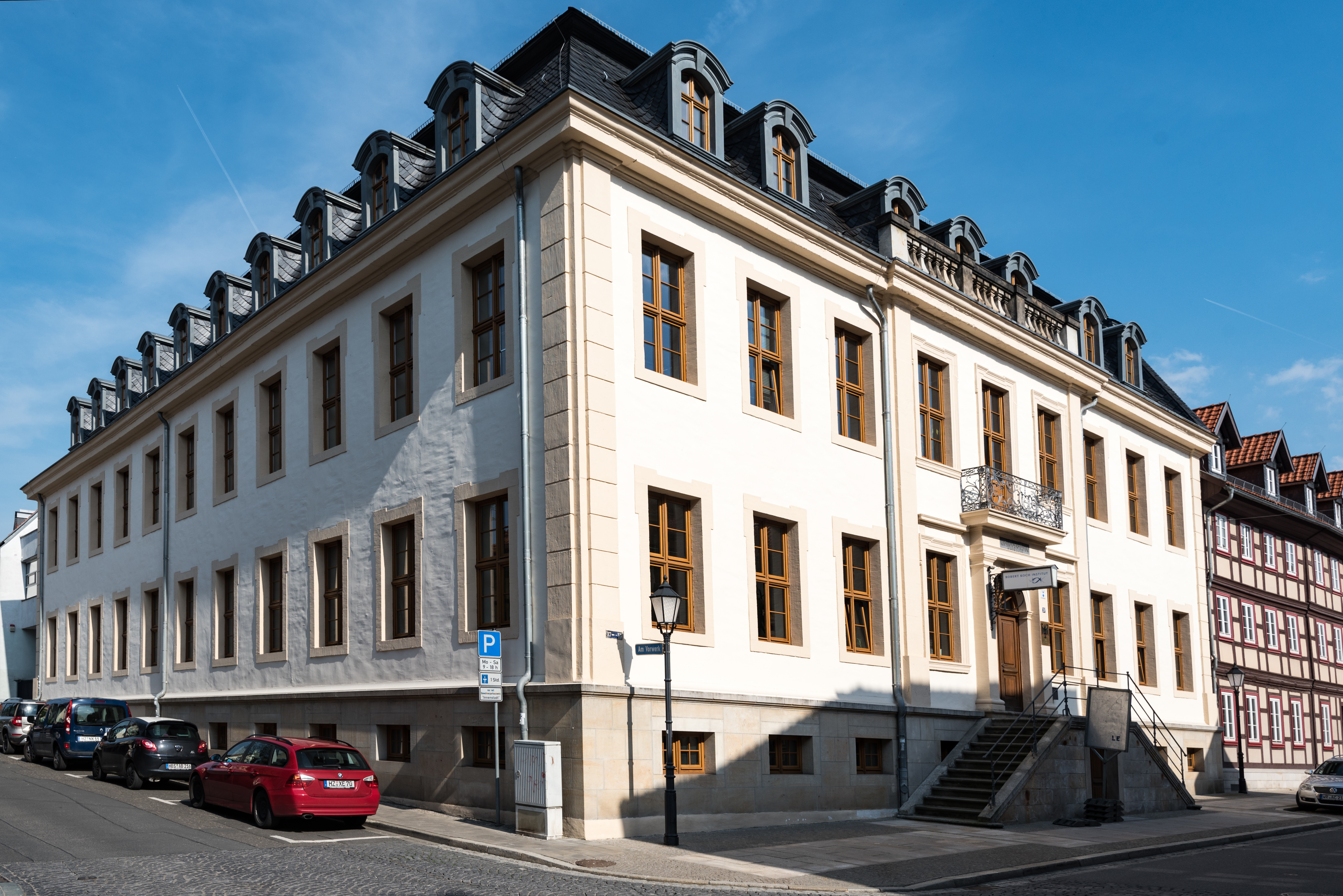 Wernigerode, Burgstraße 37, Robert-Koch-Institut